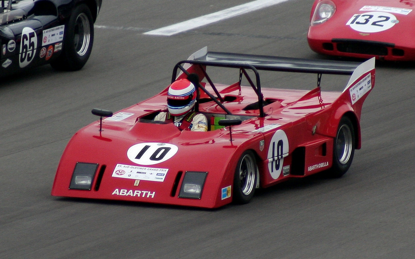 Abarth Osella PA 1 beim Oldtimer-Grand-Prix des AvD auf dem Nürburgring, auf der Geraden unmittelbar vor der Mercedes-Arena